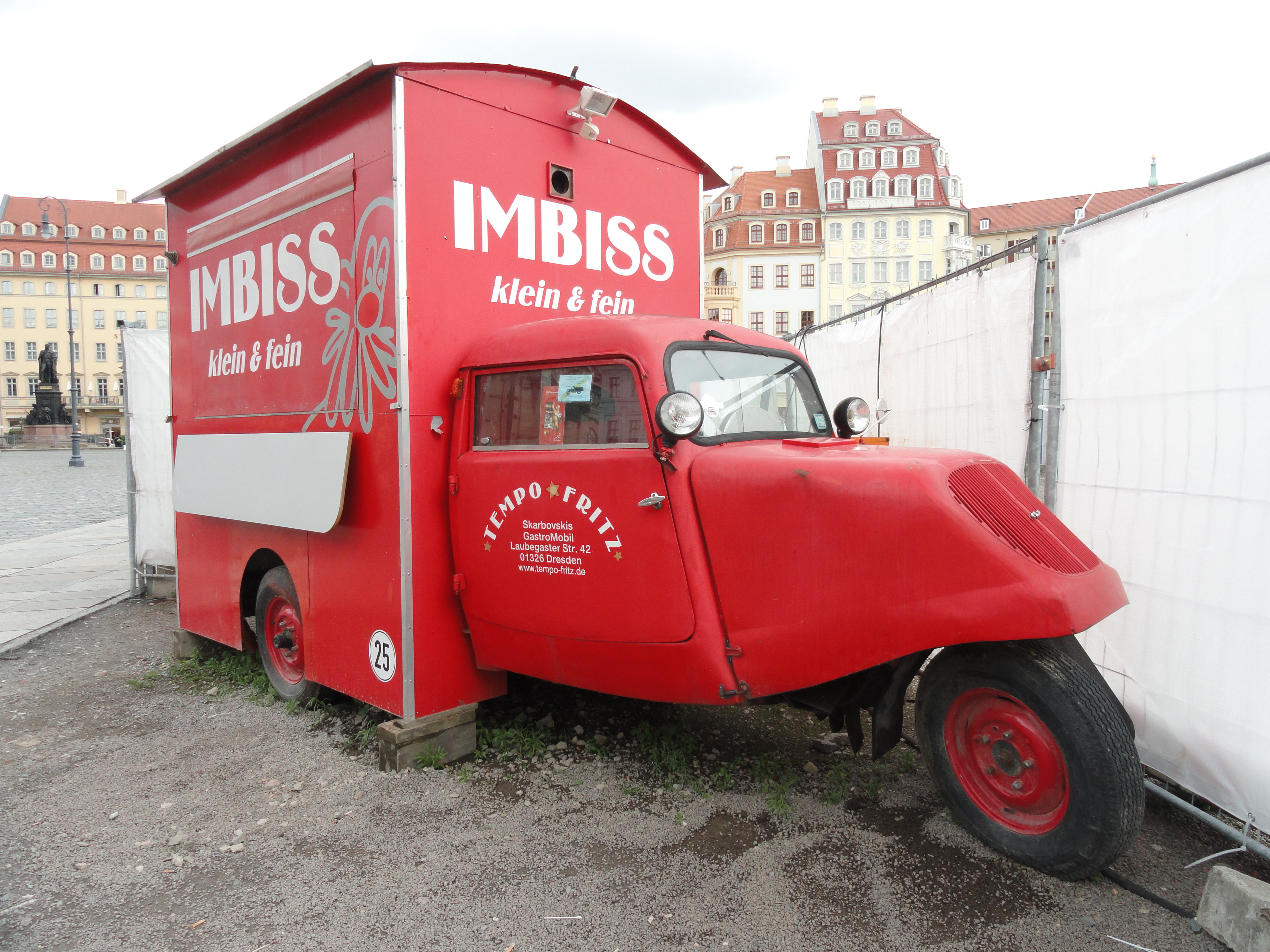 Imbiss Tempo Fritz (Tempo Hanseat) am Neumarkt in Dresden